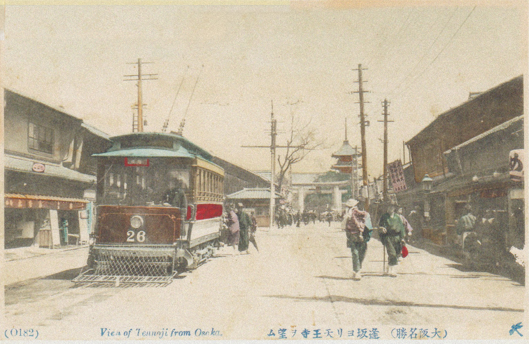 大阪の「逢坂」から四天王寺を望む。